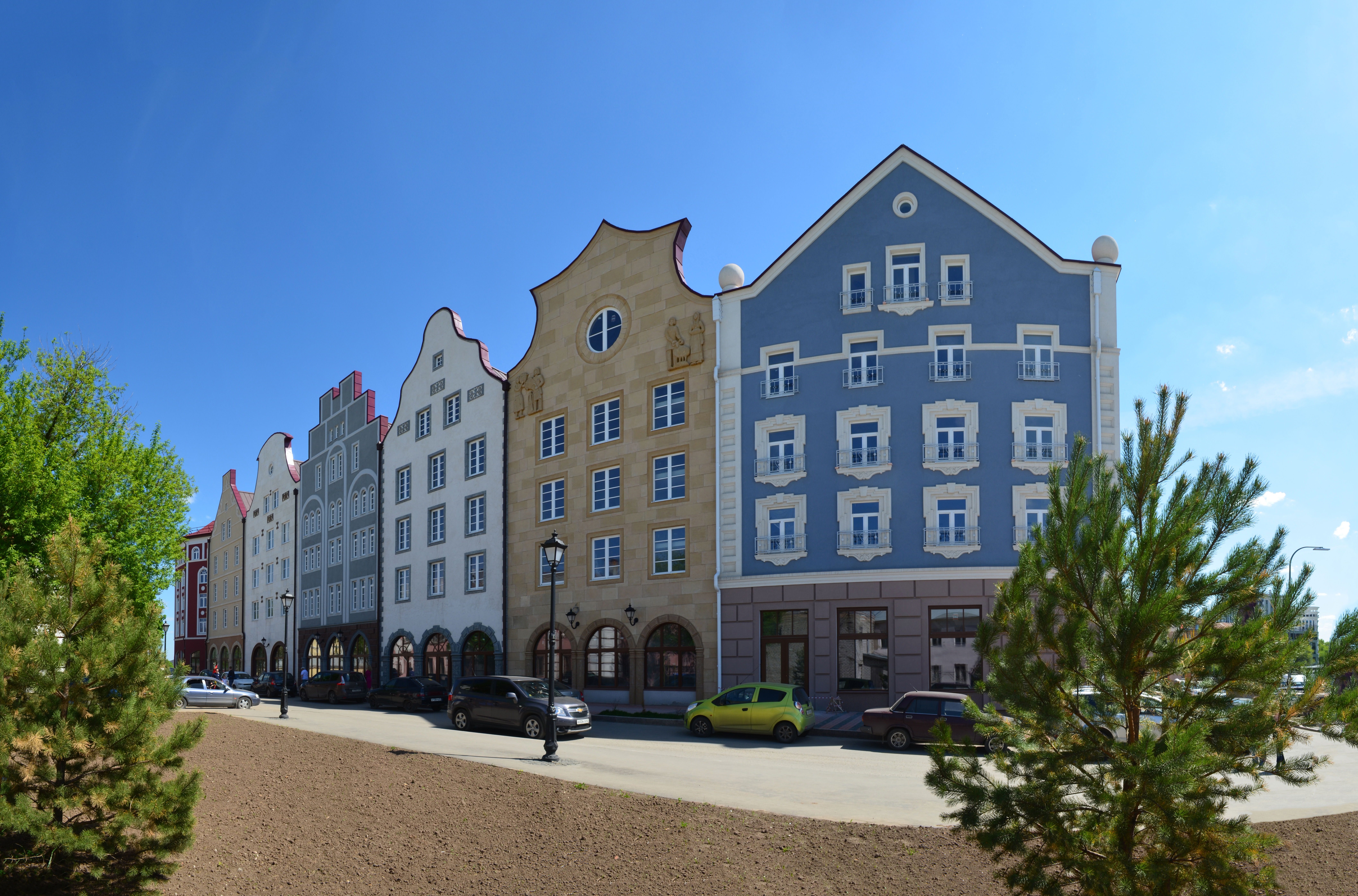 Рязань,ул.Мюнстерская,д.2.Гостинично-ресторанный комплекс "Старый город".